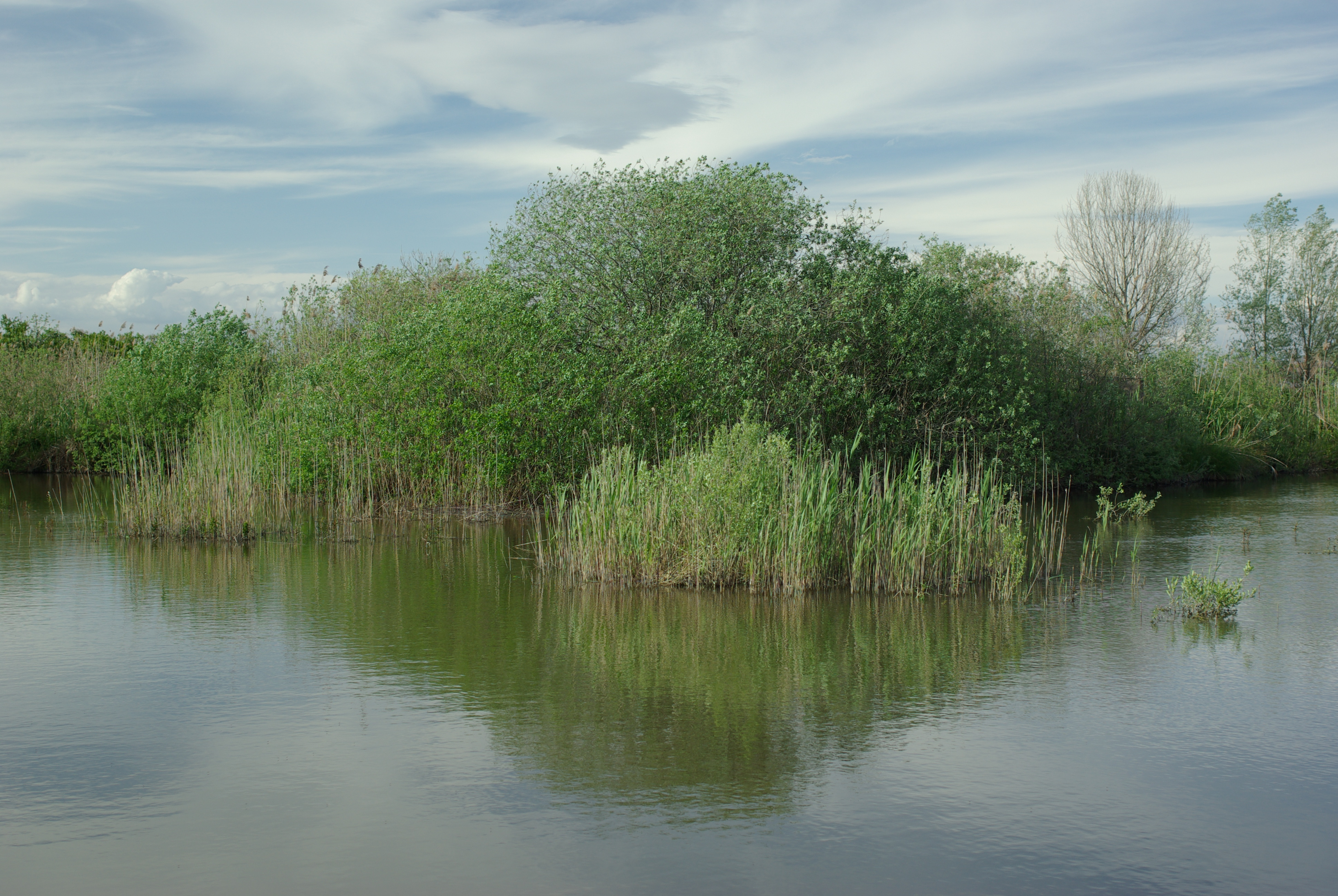 Oasi WWF della Palude del Busatello (Gazzo Veronese VR) Giornata delle Oasi 2012-04-25 photo WWF Verona Paolo Villa